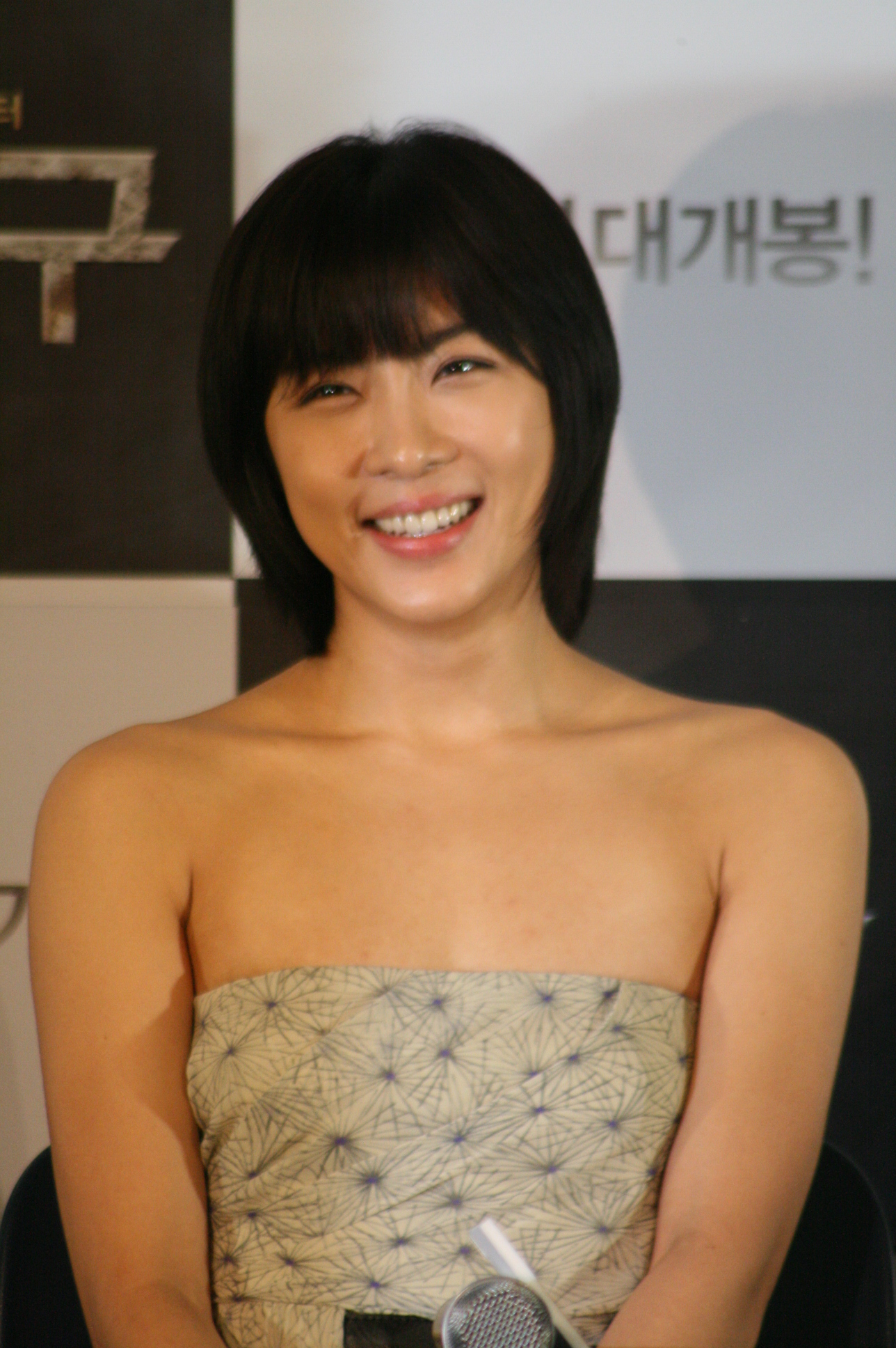 7광구 020